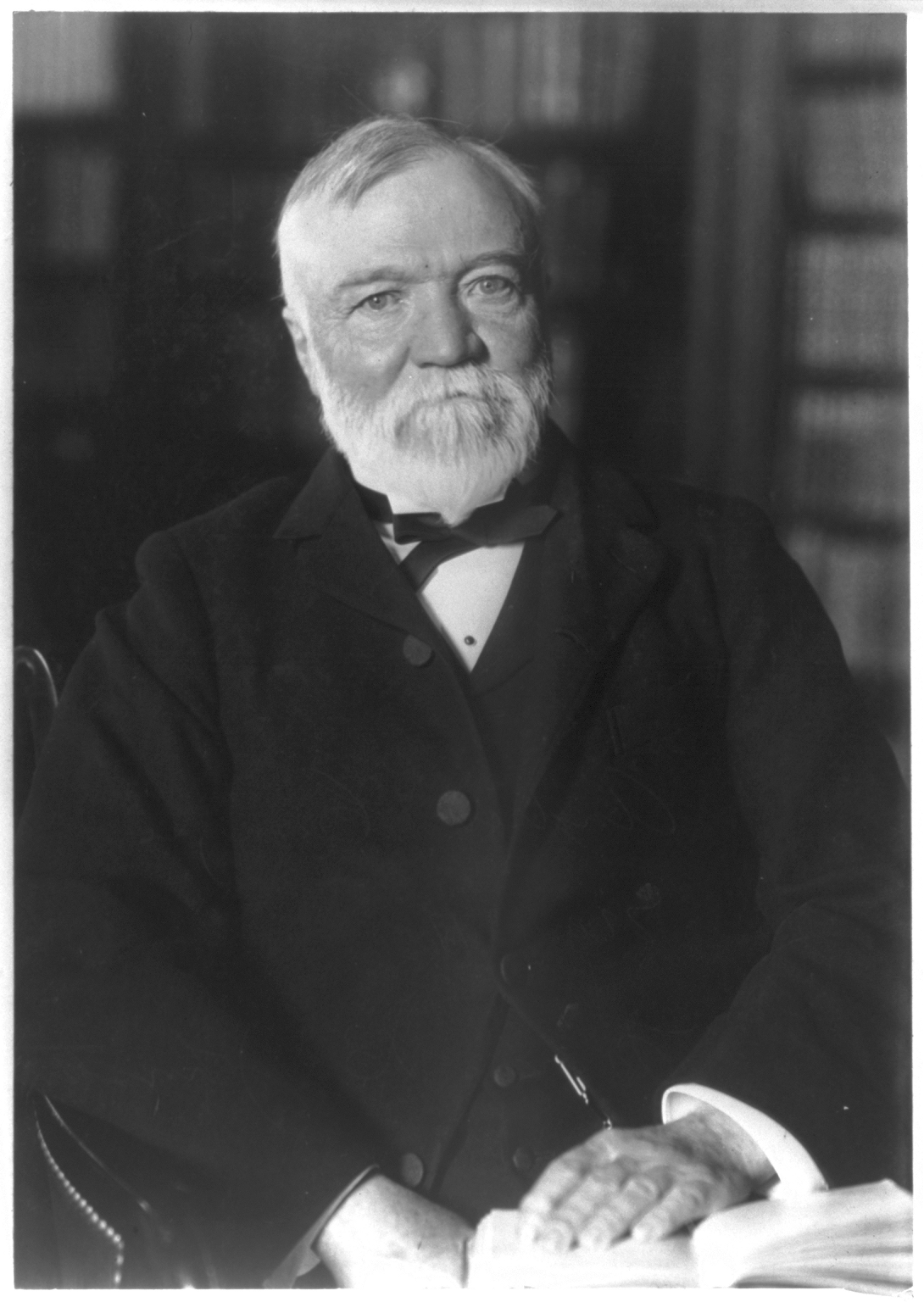 Andrew Carnegie